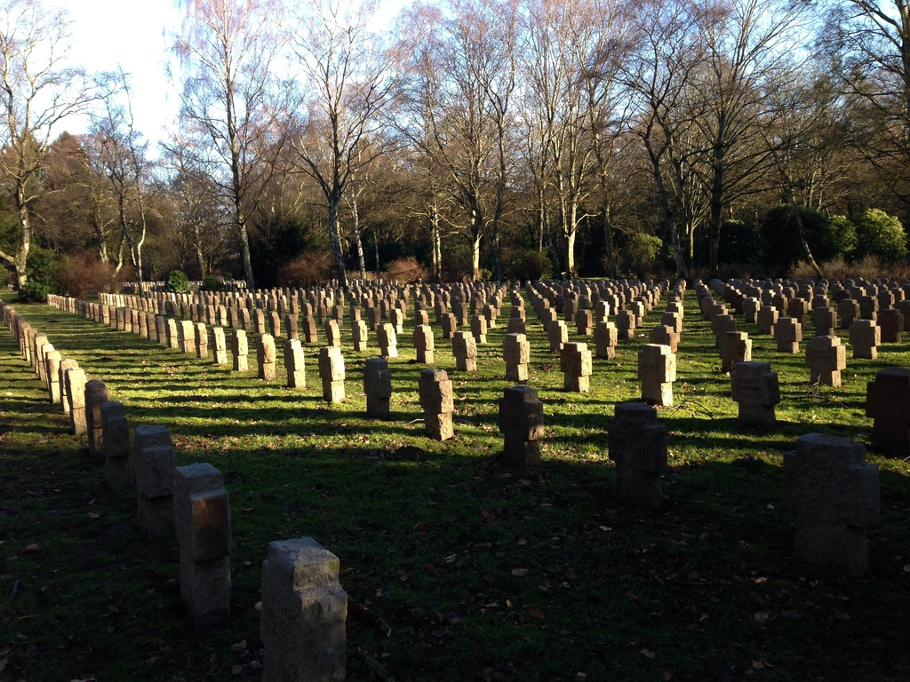 Kriegsgräberstätte mit 3032 SteinkreuzenThis is a photograph of an architectural monument., no. A 1037